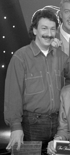 Ferry de Groot